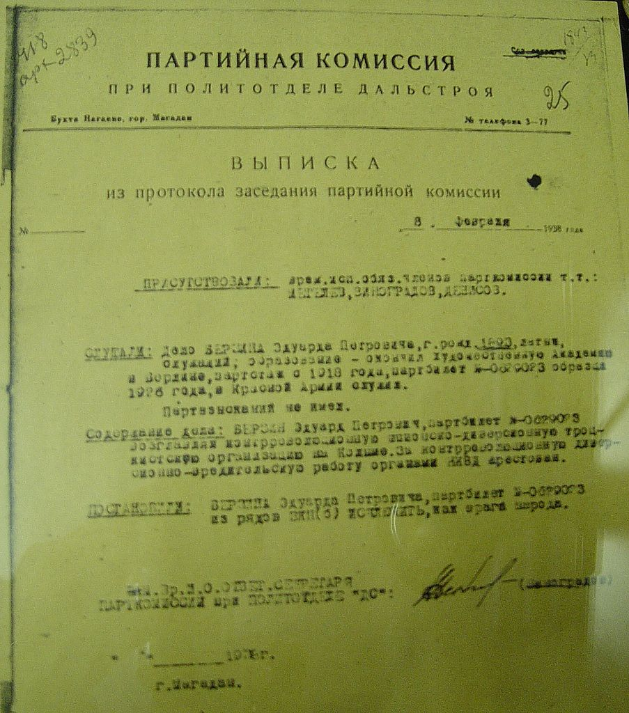 Выписка из протокола заседания парткомиссии при Политотделе "Дальстроя" от 8 февраля 1938 г. об исключении Берзина Э. П. из рядов ВКП(б). Из экспозиции Магаданского областного краеведческого музея.